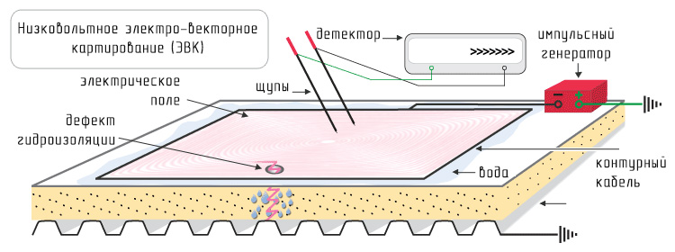 Схема проведения диагностики методом низковольтного электро-векторного картирования.